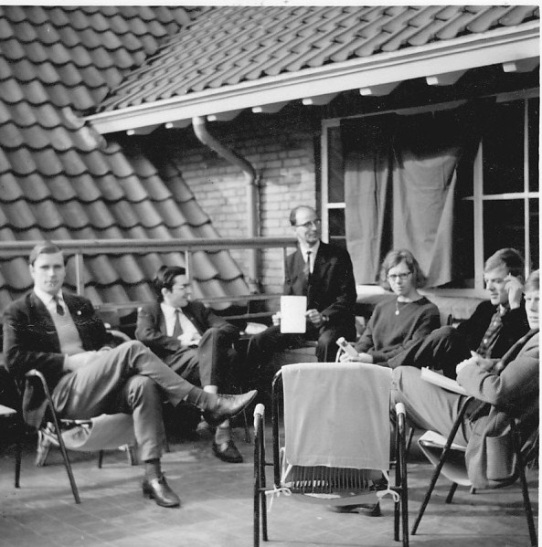 NEJ-semajnfino en la junula gastejo de Arnhemo.